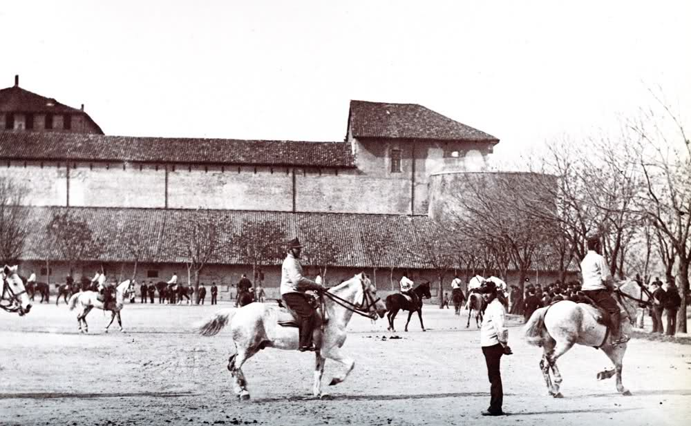 Milano, esercizi equestri nella vecchia piazza d'armi, davanti alla Ghirlanda del Castello